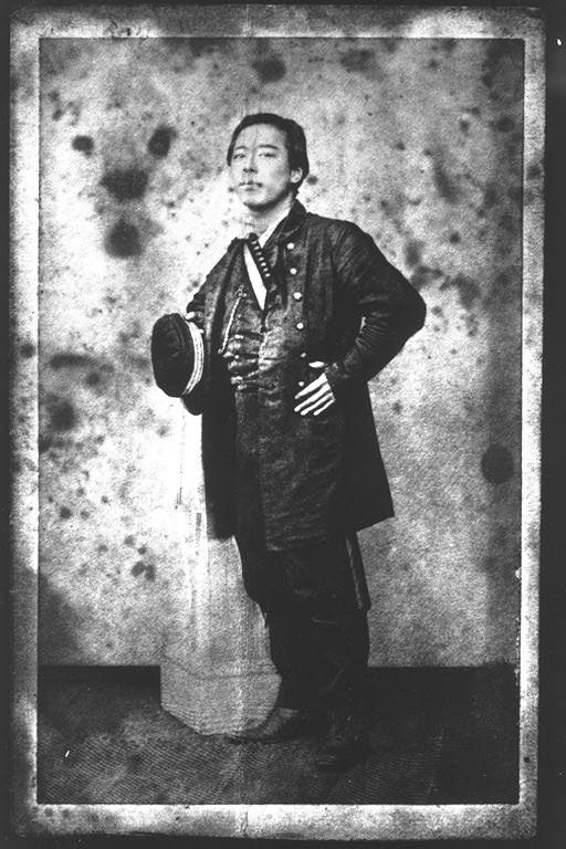 慶應義塾初代塾長古川節藏(岡本周吉)。榎本軍軍服姿